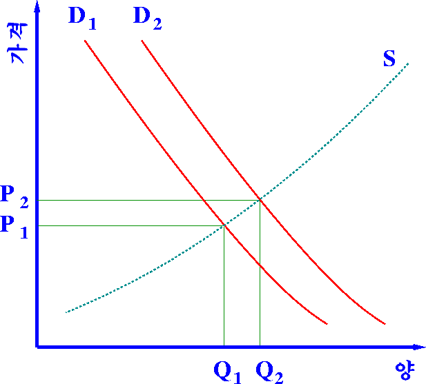 이 수요공급곡선은 상품의 공급과 수요 사이의 균형에 따라 어떻게 가격이 결정되는지 보여준다. 당 도식은 수요가 D1에서 D2로 증가하면 가격이 상승하고, 공급곡선 상의 새로운 균형점에서의 새로운 양이 필요하게 된다.